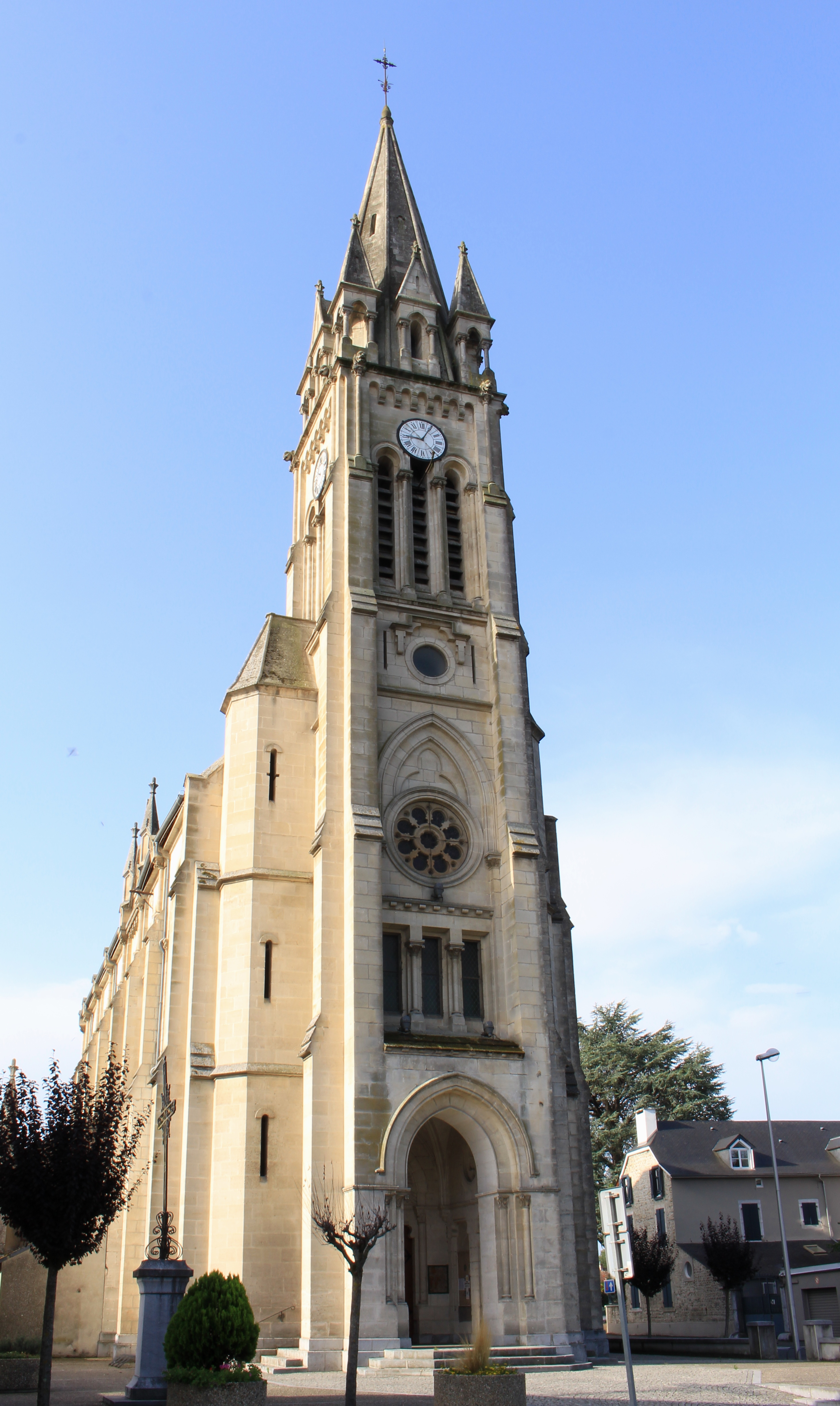 Église Saint-Barthélémy de Bordères-sur-l'Échez (Hautes-Pyrénées)